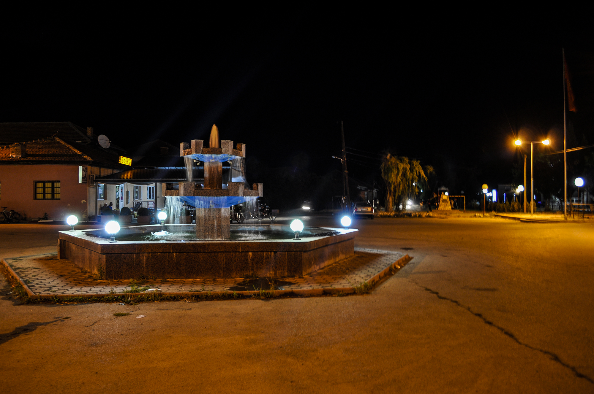 Волино убава фонтана среде место.